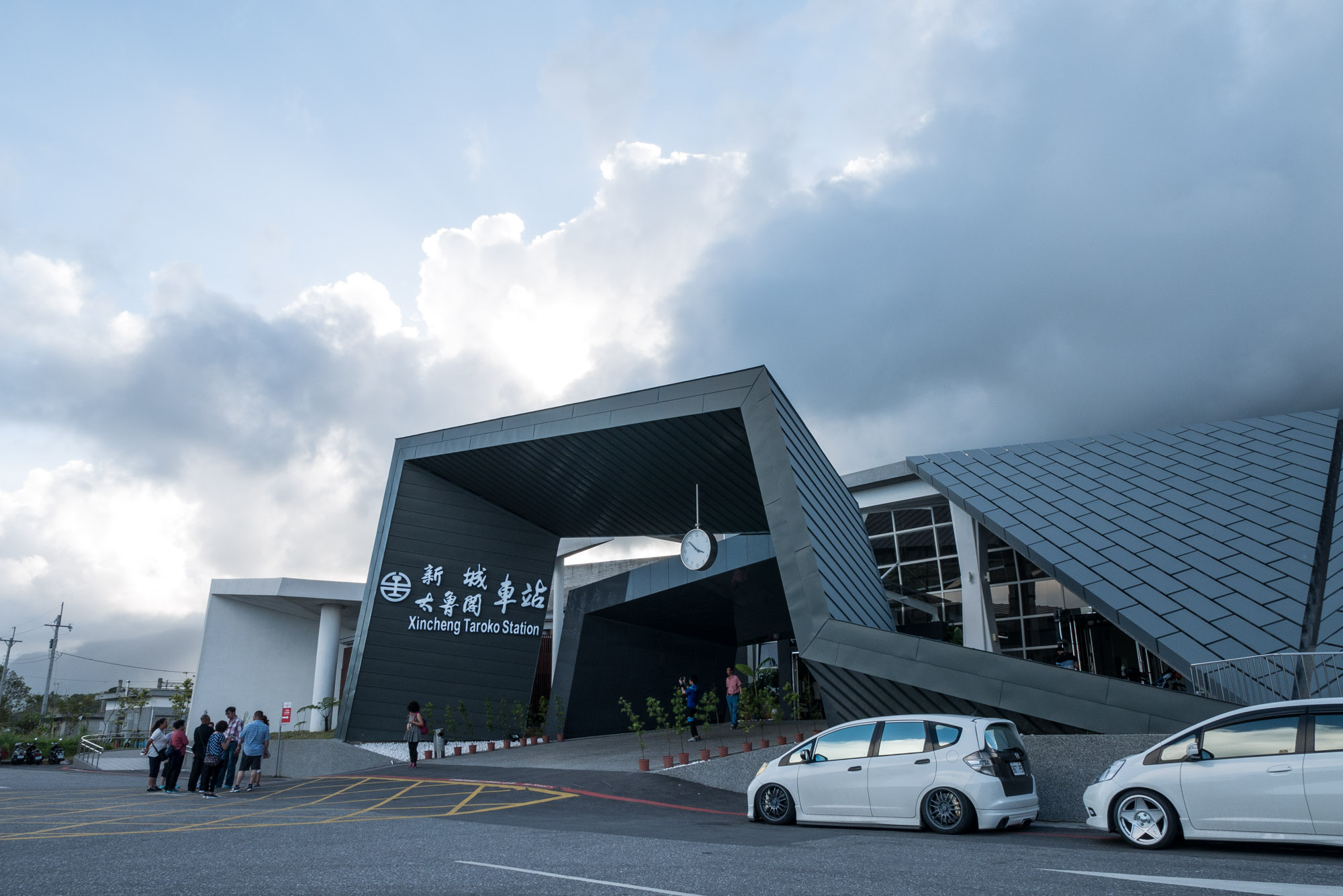 中文（台灣）: 臺灣鐵路管理局新城（太魯閣）車站。